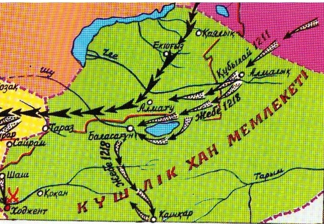 Күшлік хан мемлекеті